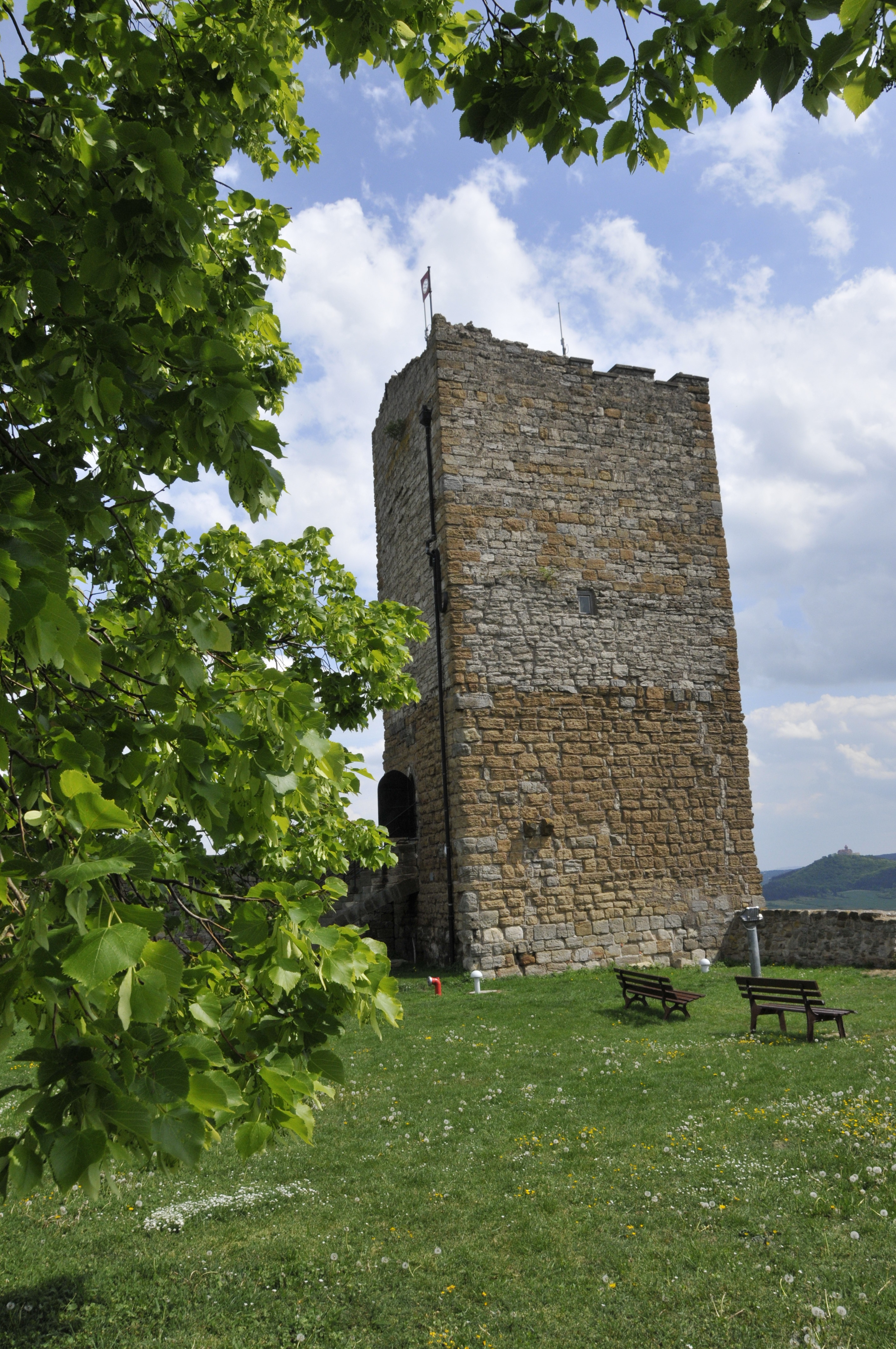 Bergfried von Burg Gleichen aus Nord